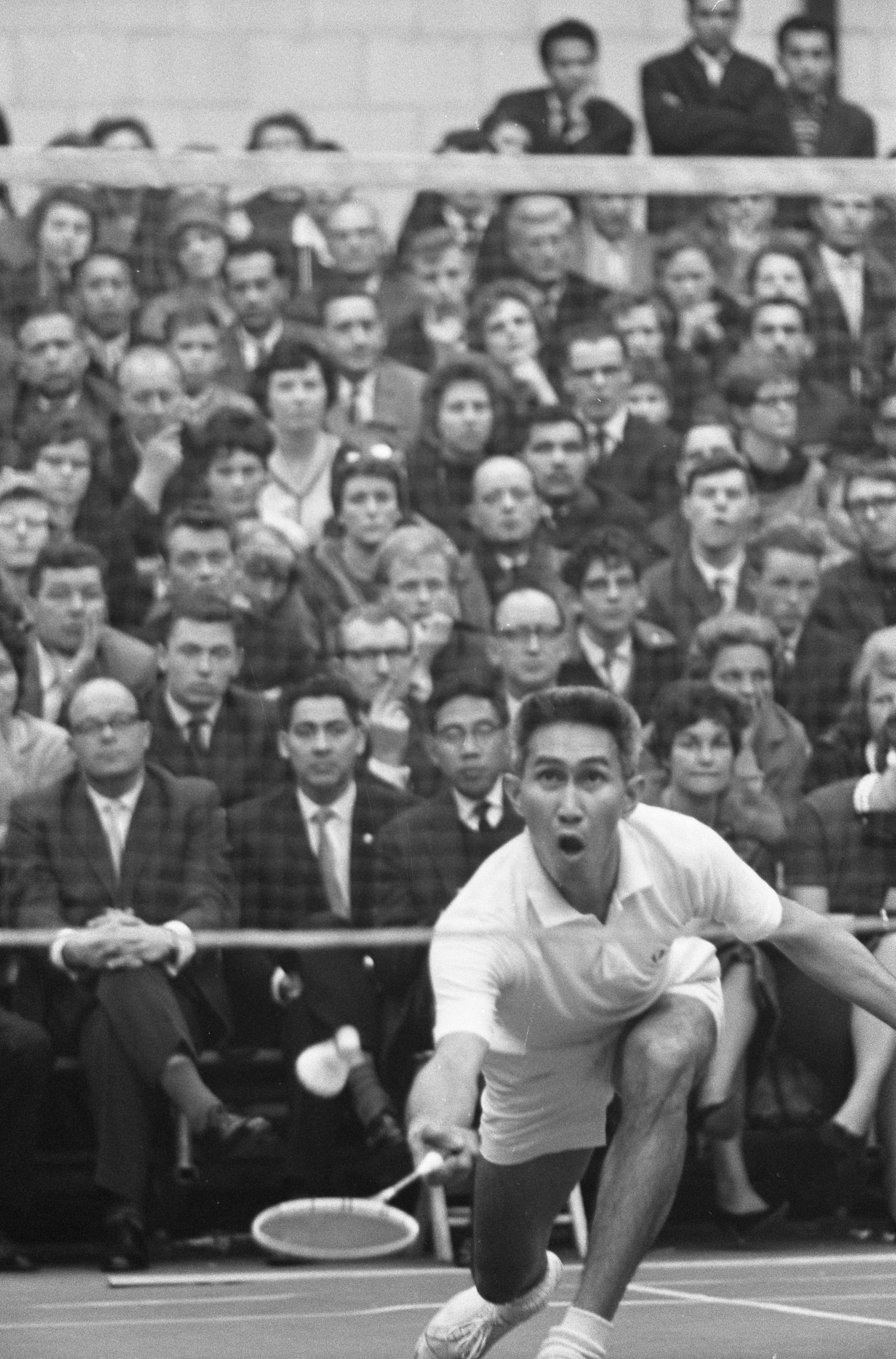 Collectie / Archief : Fotocollectie Anefo Reportage / Serie : [ onbekend ] Beschrijving : Internationale Badmintonkampioenschappen Haarlem in nieuw "Duinwijck" hal. Sonneville Datum : 11 februari 1962 Locatie : Haarlem Trefwoorden : Badminton, kampioenschappen Instellingsnaam : Sonneville Fotograaf : Pot, Harry / Anefo Auteursrechthebbende : Nationaal Archief Materiaalsoort : Negatief (zwart/wit) Nummer archiefinventaris : bekijk toegang 2.24.01.05 Bestanddeelnummer : 913-5116